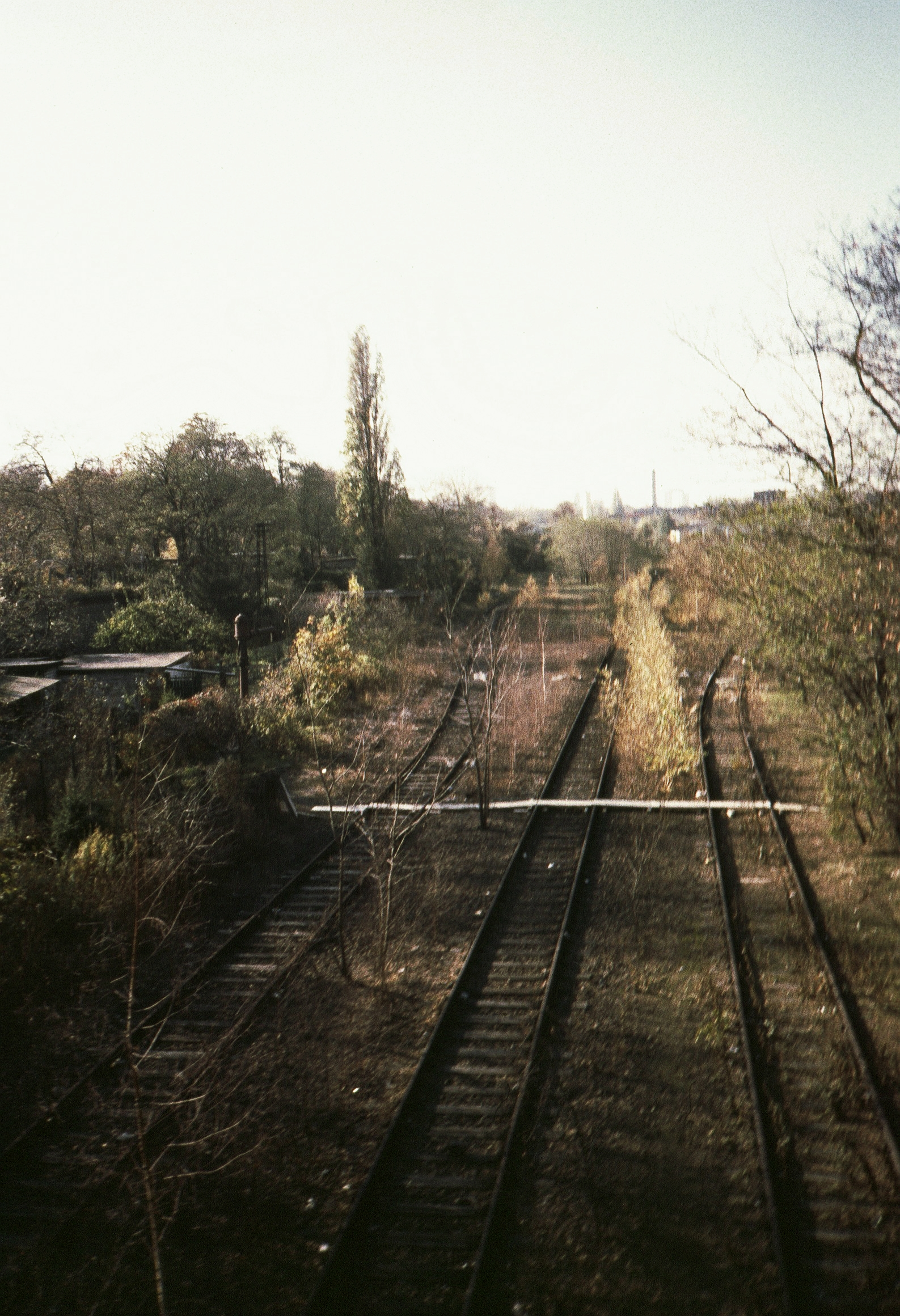 Berlin Bf Spreeufer